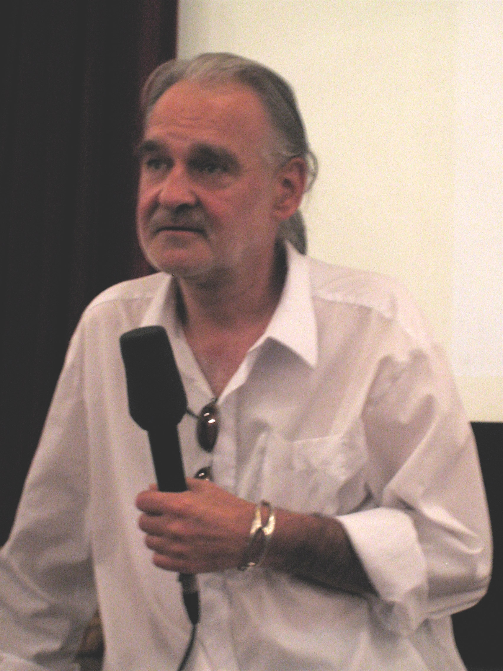 Bela Tarr stellt auf dem Sarajevo Film Festival seinen Film "The Man from London" vor.